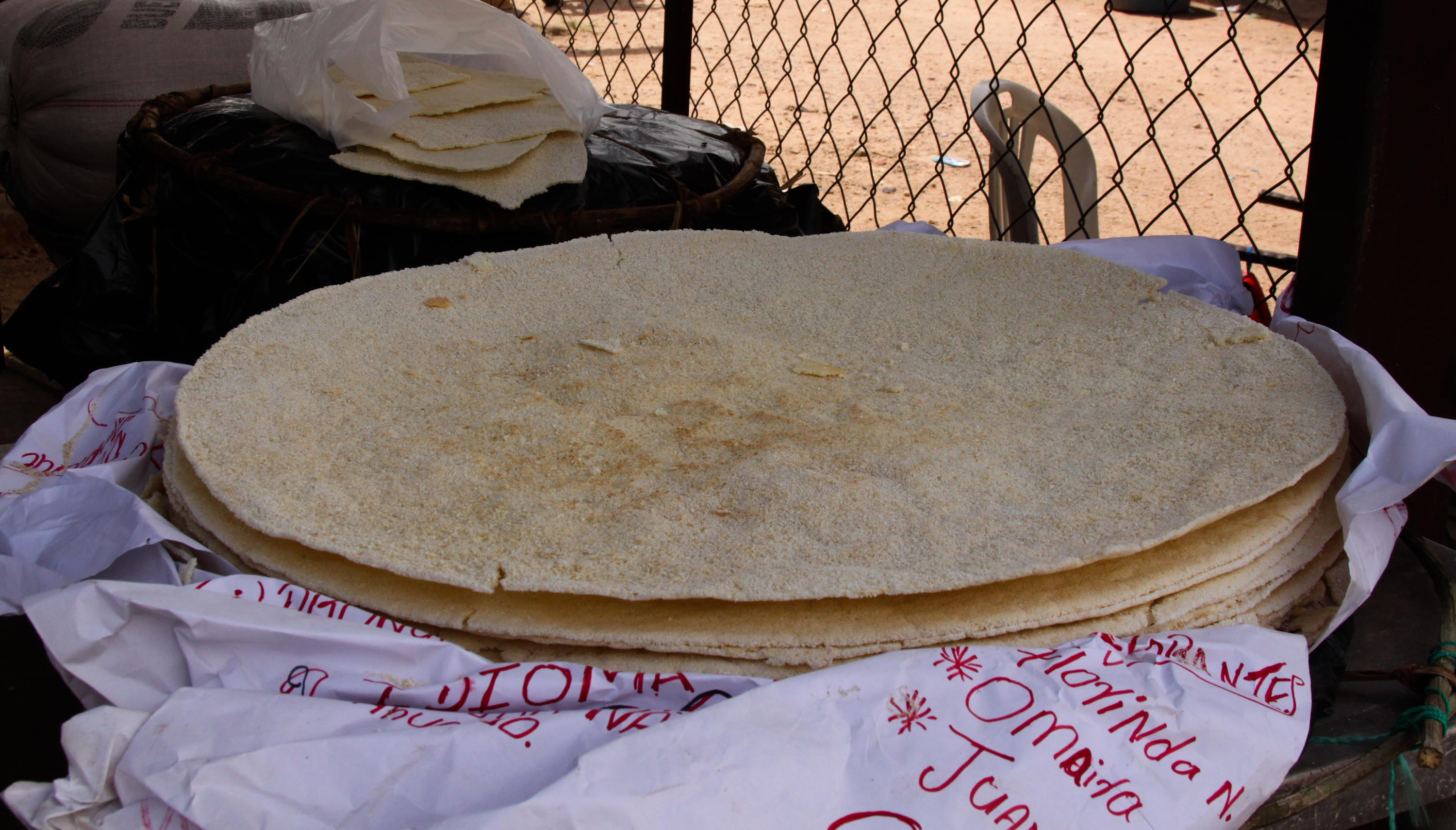 Casabe para la venta en mercado de Puerto Ayacucho, en el estado Amazonas, Venezuela